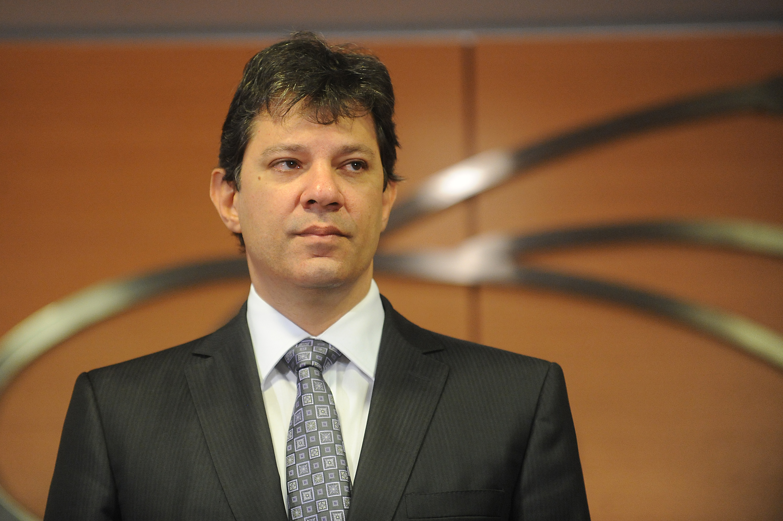 Fernando Haddad como ministro da educação em 2011